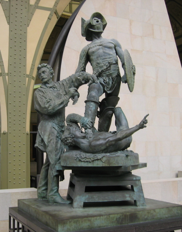 Gérôme exécutant les Gladiateurs - sculpté par Jean-Léon Gérôme et Aimé Morot - Musée d'Orsay à Paris